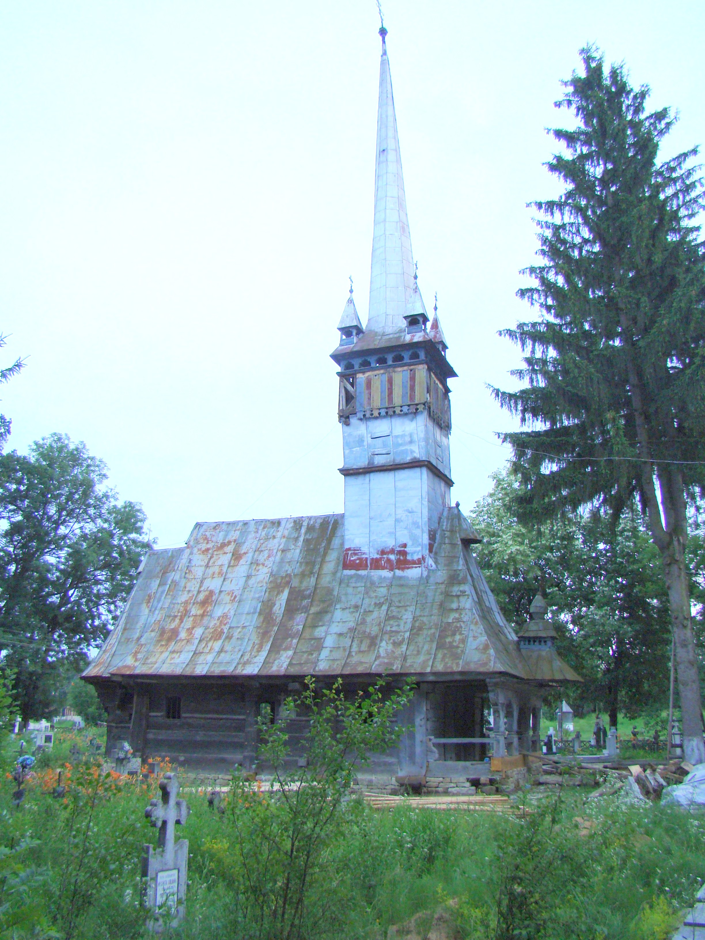 Biserica de lemn din Coruia 01